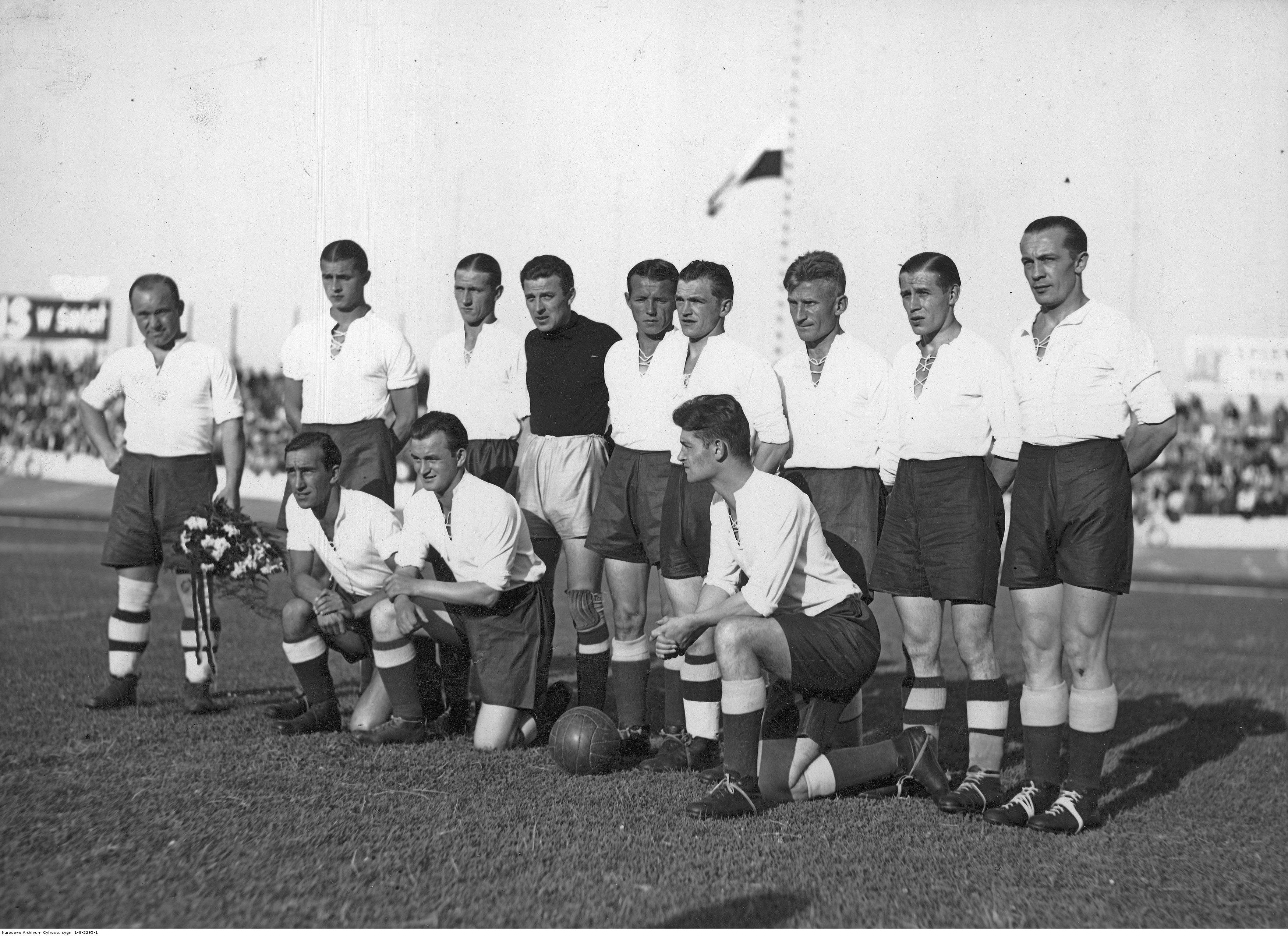 Mecz piłki nożnej Olimpijska Reprezentacja Polski - Phoebus (Węgry) w Warszawie. W górnym rzędzie: Henryk Martyna (pierwszy z lewej), Teodor Peterek (drugi z lewej), Ryszard Piec (trzeci z lewej), Spirydion Albański (czwarty z lewej), Józef Kotlarczyk (piąty z lewej), Władysław Szczepaniak (osmy z lewej), Walerian Kisieliński (dziewiąty z lewej). W dolnym rzędzie: Jan Wasiewicz, Hubert Gad, Fryderyk Scherfke.